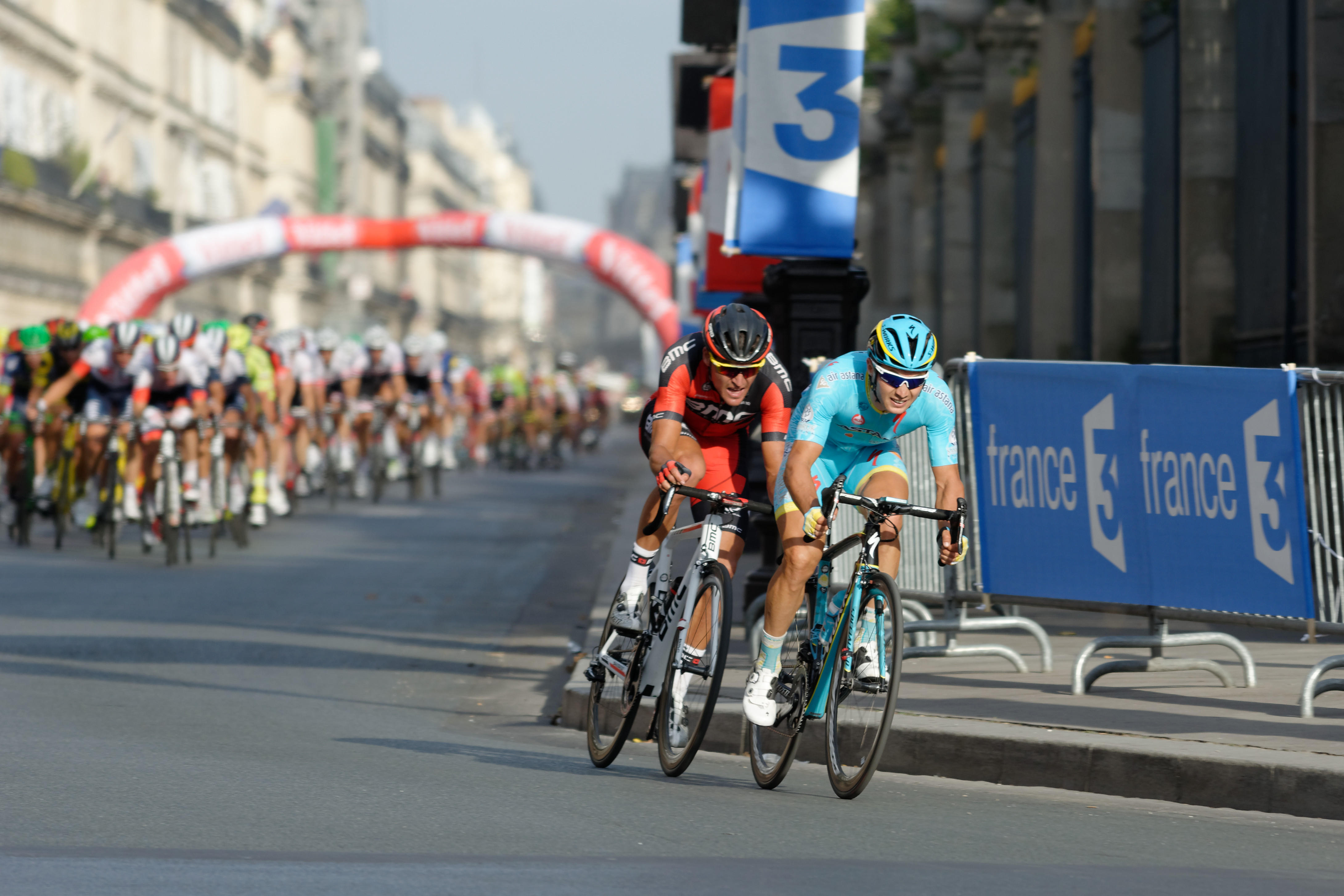 D71_0318_DxO